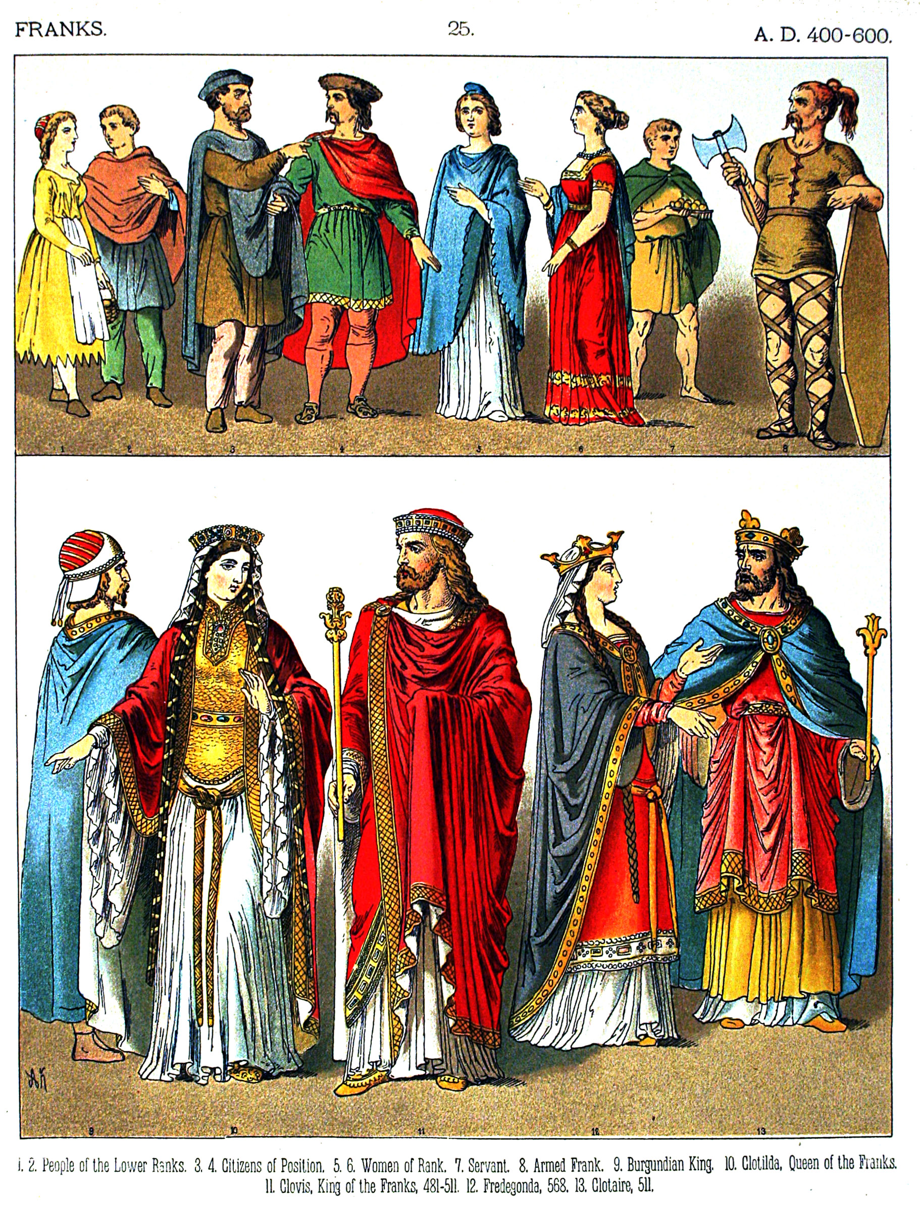 A.D. 400-600, Franks